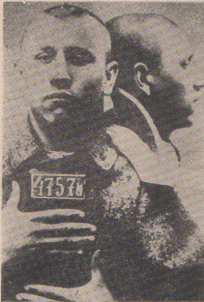 Srpskohrvatski / српскохрватски: Policijski snimak Aleksandra Rankovića u sremsko-mitrovačkoj kaznioni 1929. godine.